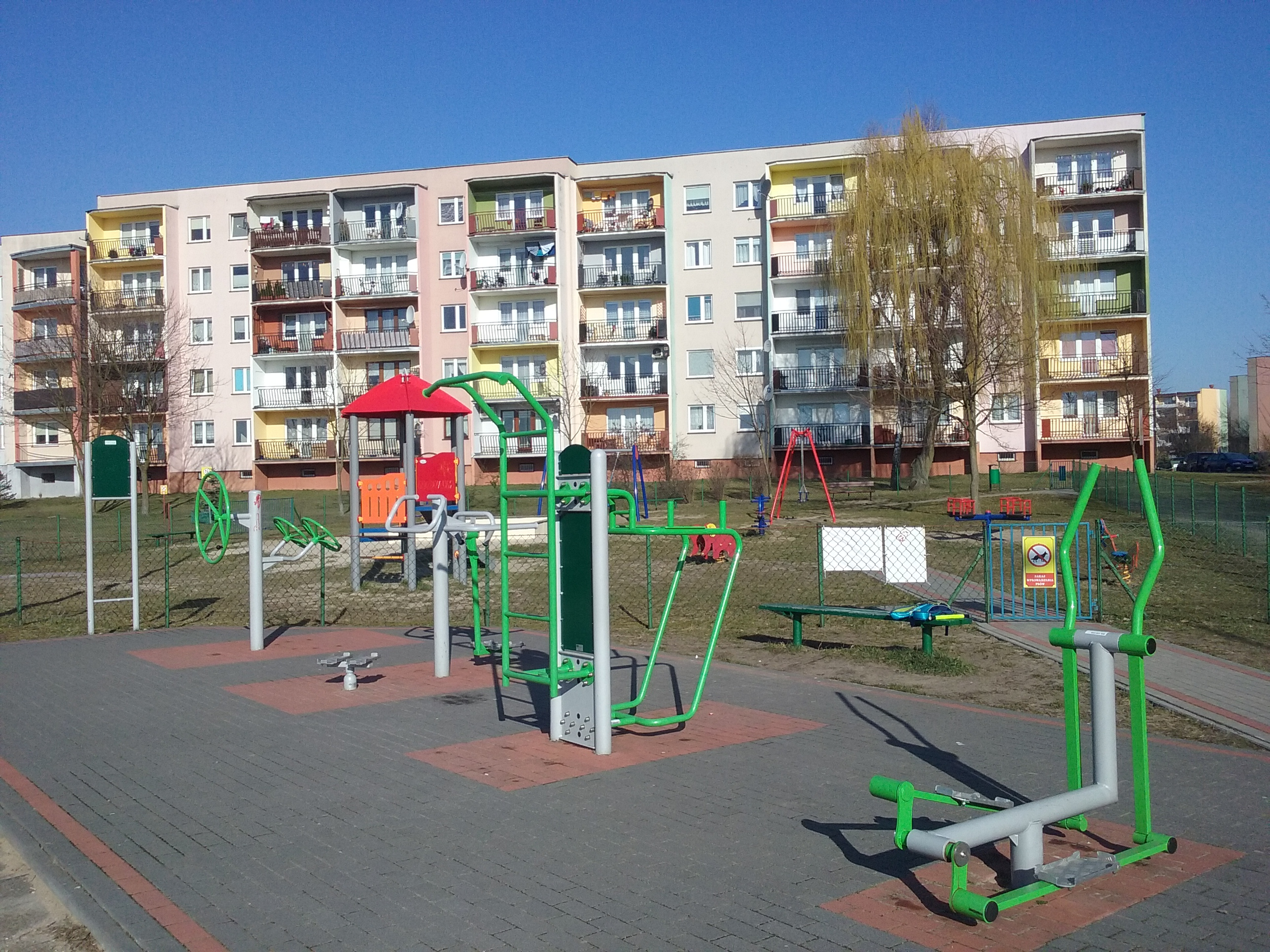 Ogólnodostępna siłownia na wolnym powietrzu w 60-tysięcznym Tomaszowie Mazowieckim. Ulica Sikorskiego